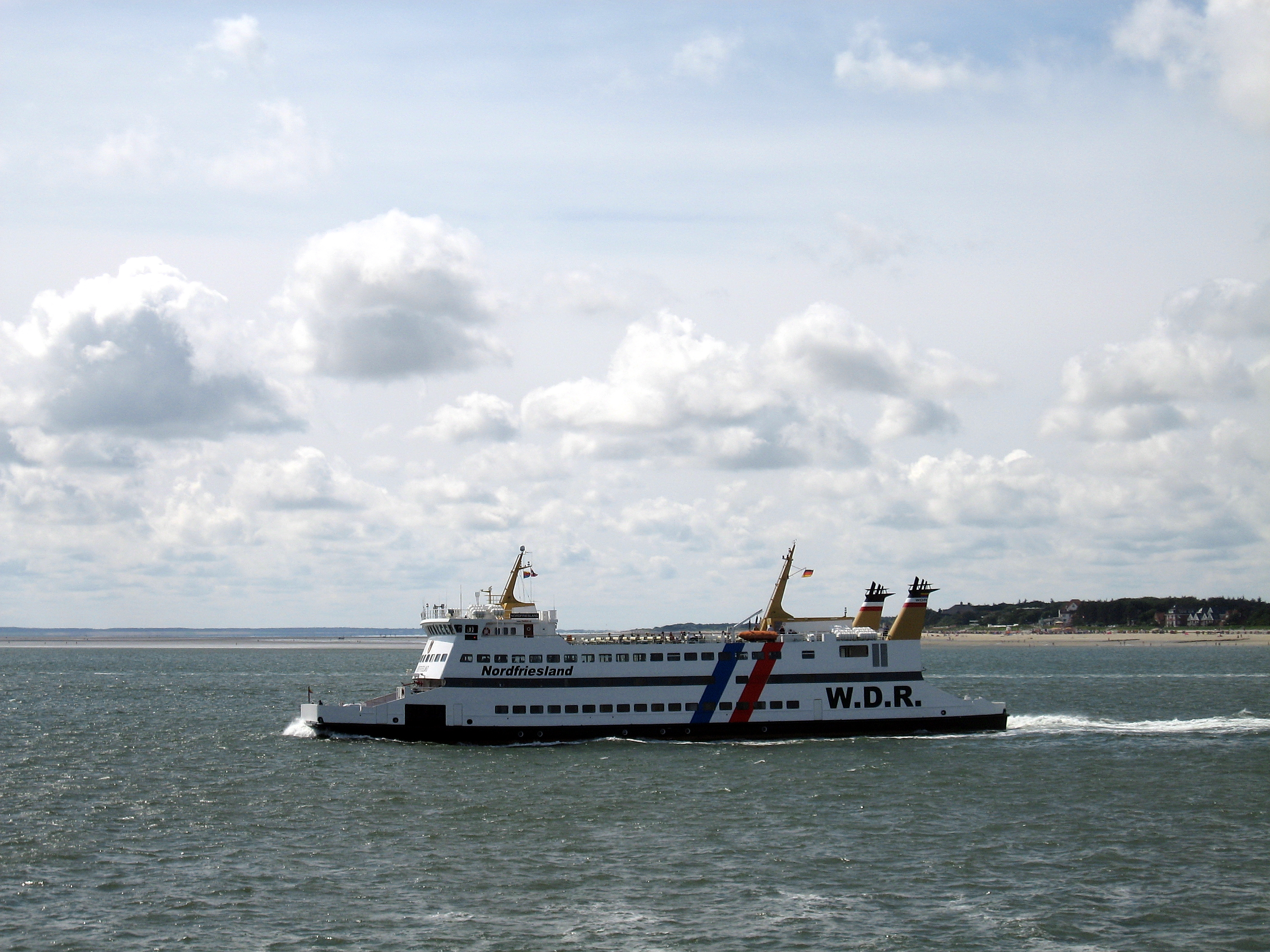 Föhr, W.D.R.-Fähre „Nordfriesland“ vor Föhr IMO Number: 9102758 MMSI Number: 211222960 Callsign: DJLK Length: 67 m Beam: 15 m